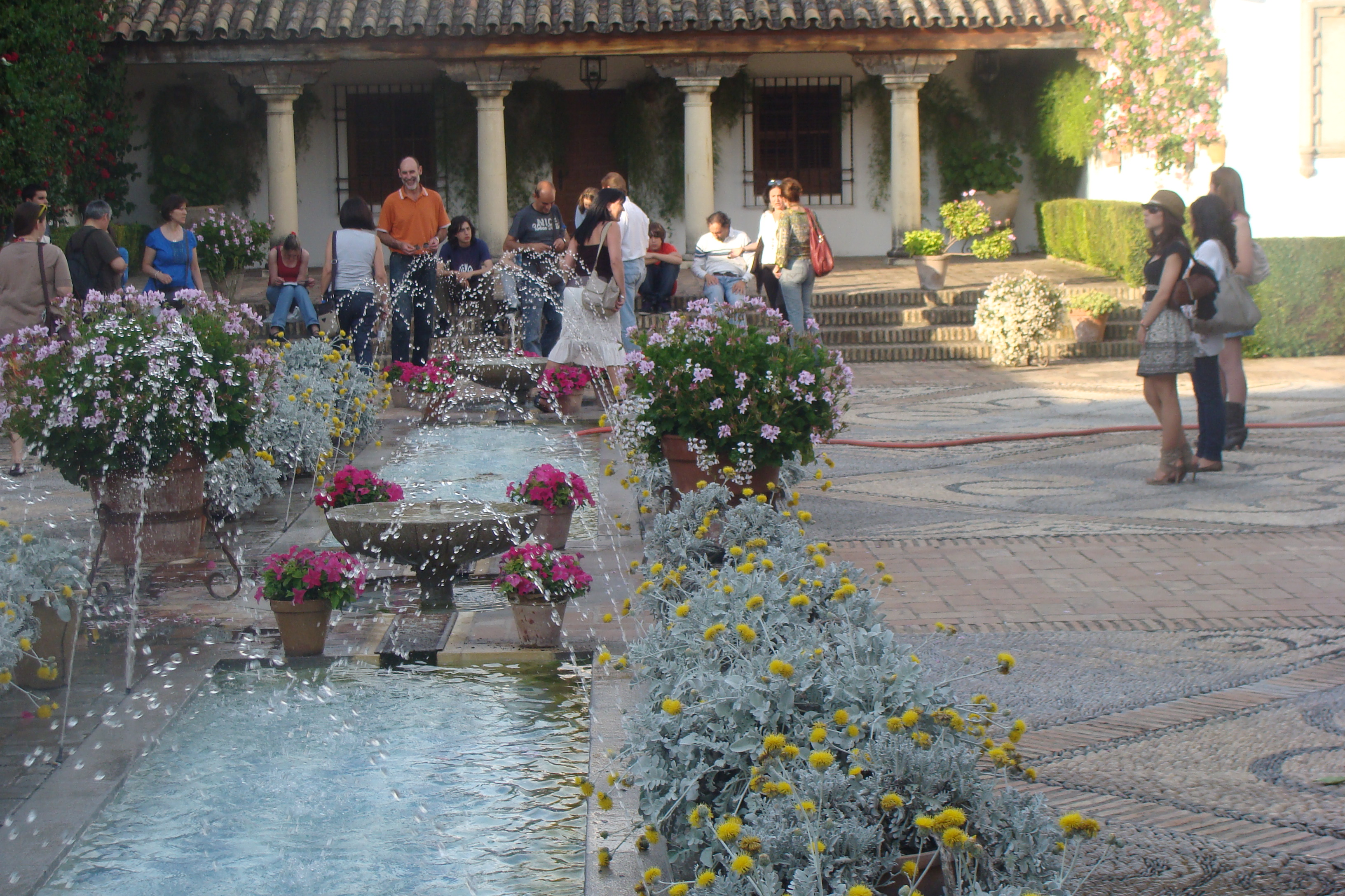 Festival de los patios en Córdoba, España.